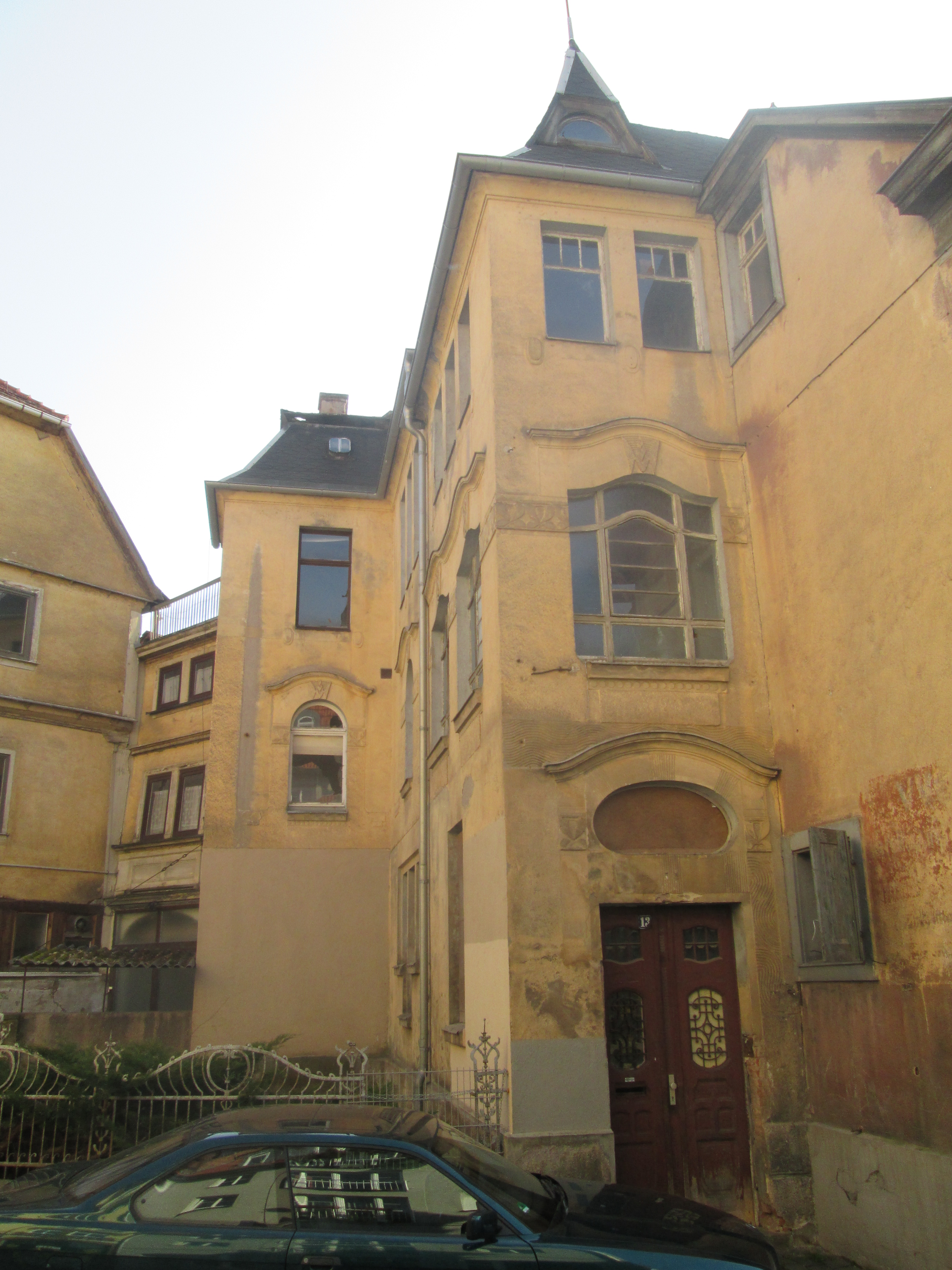 Treppenhaus